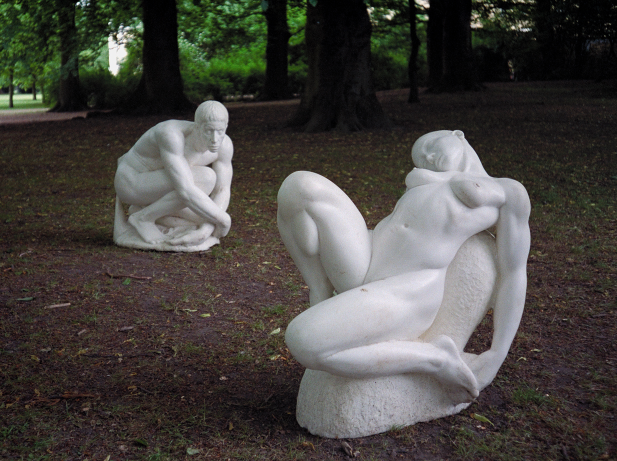 Jerry Adder (Allan Justesen) Två verk, In the 11 th. Hour, och Caught between Heaven and Hell, i Malmö under Malmo-Copenhagen Sculpture Biennal 2000.